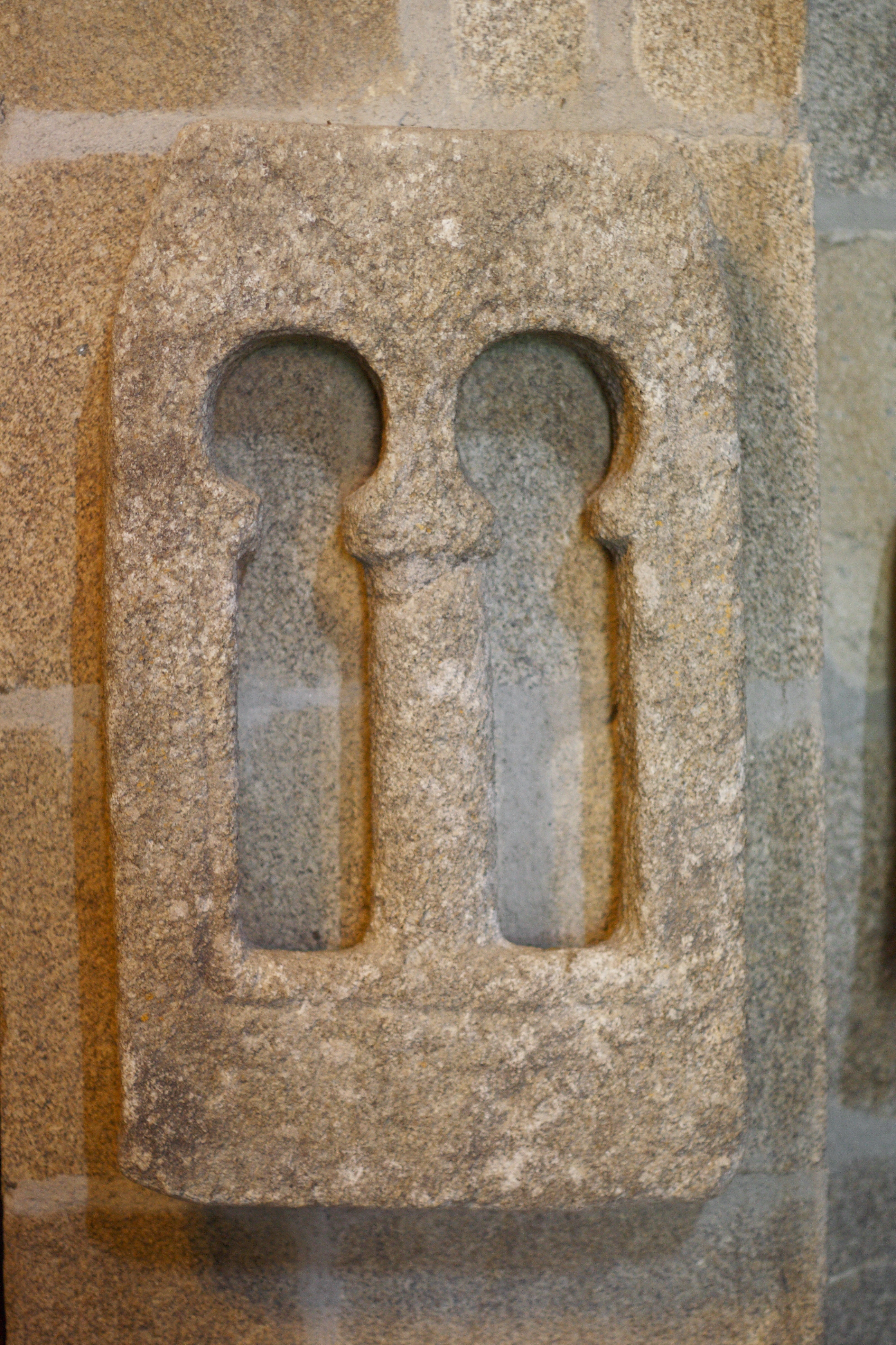 Katholische Pfarrkirche San Miguel in Eiré (Pantón) in der spanischen Provinz Lugo (Galicien), Zwillingsfenster mit Hufeisenbogen